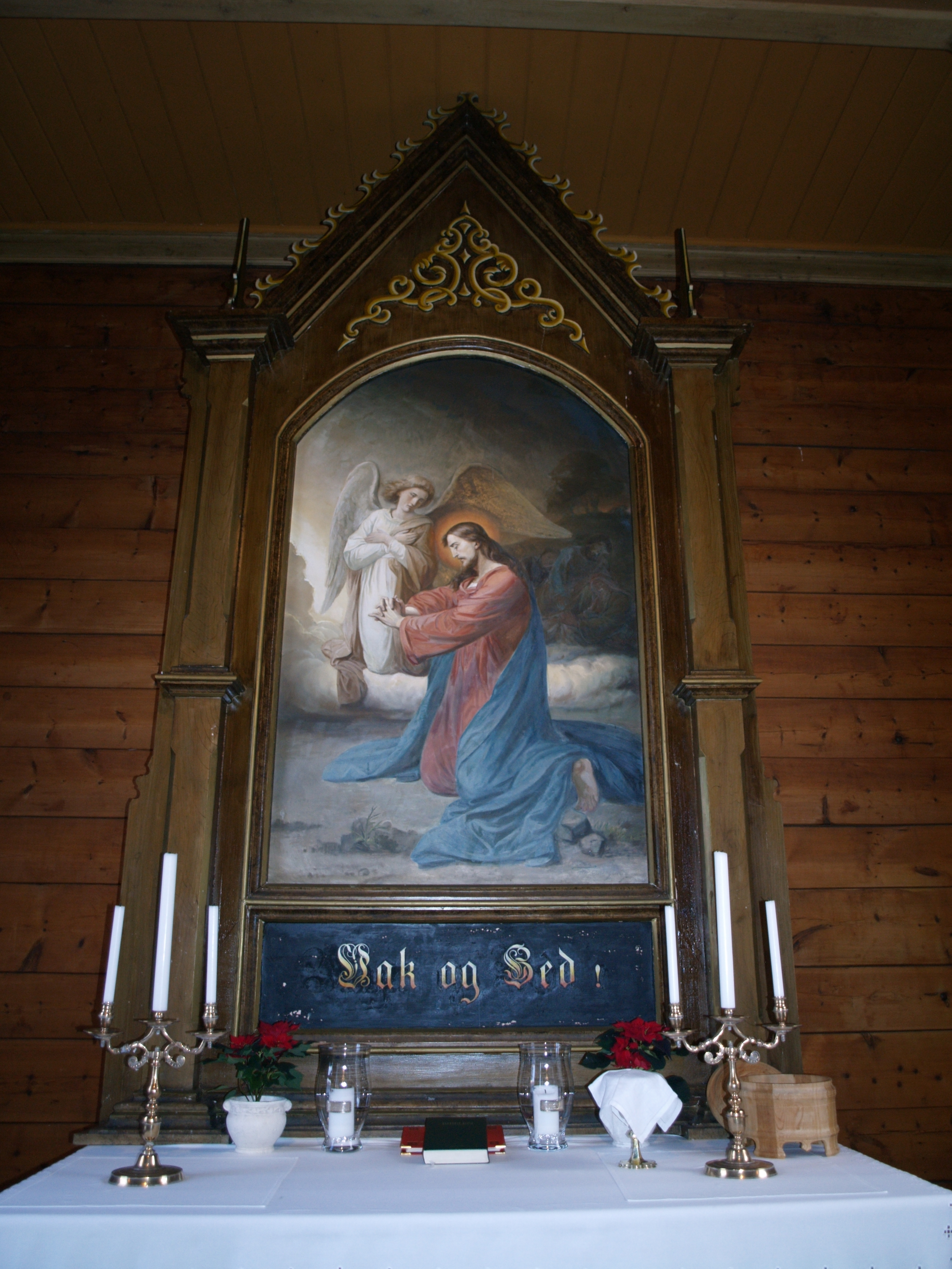 Altertavlen i Feios kirke, med bilde malt av Christen Brun i kopi etter Otto Mengelberg. Foto: Jan Magne Borlaug Rinde, fra Lokalhistoriewiki.